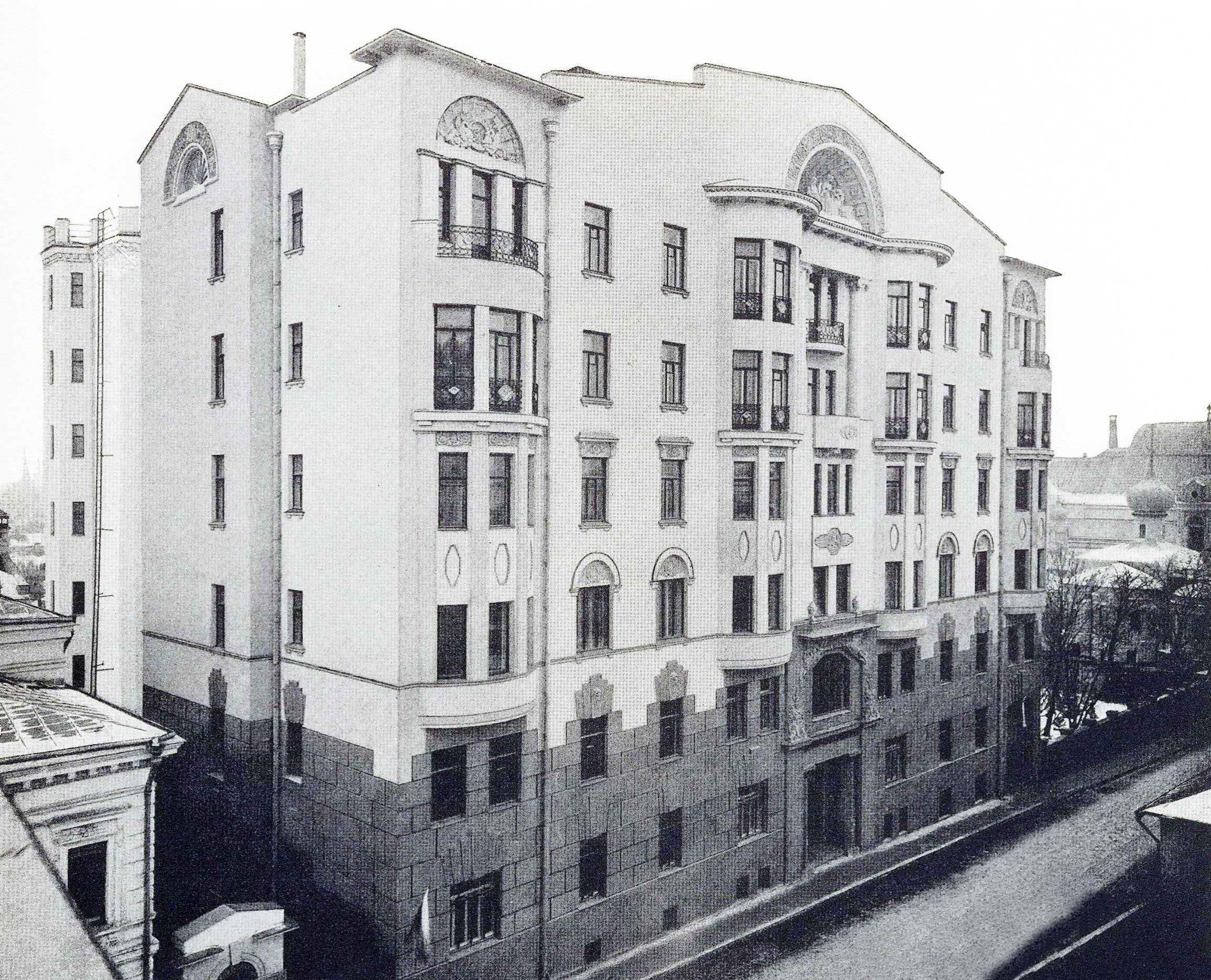 Доходный дом Стуловых